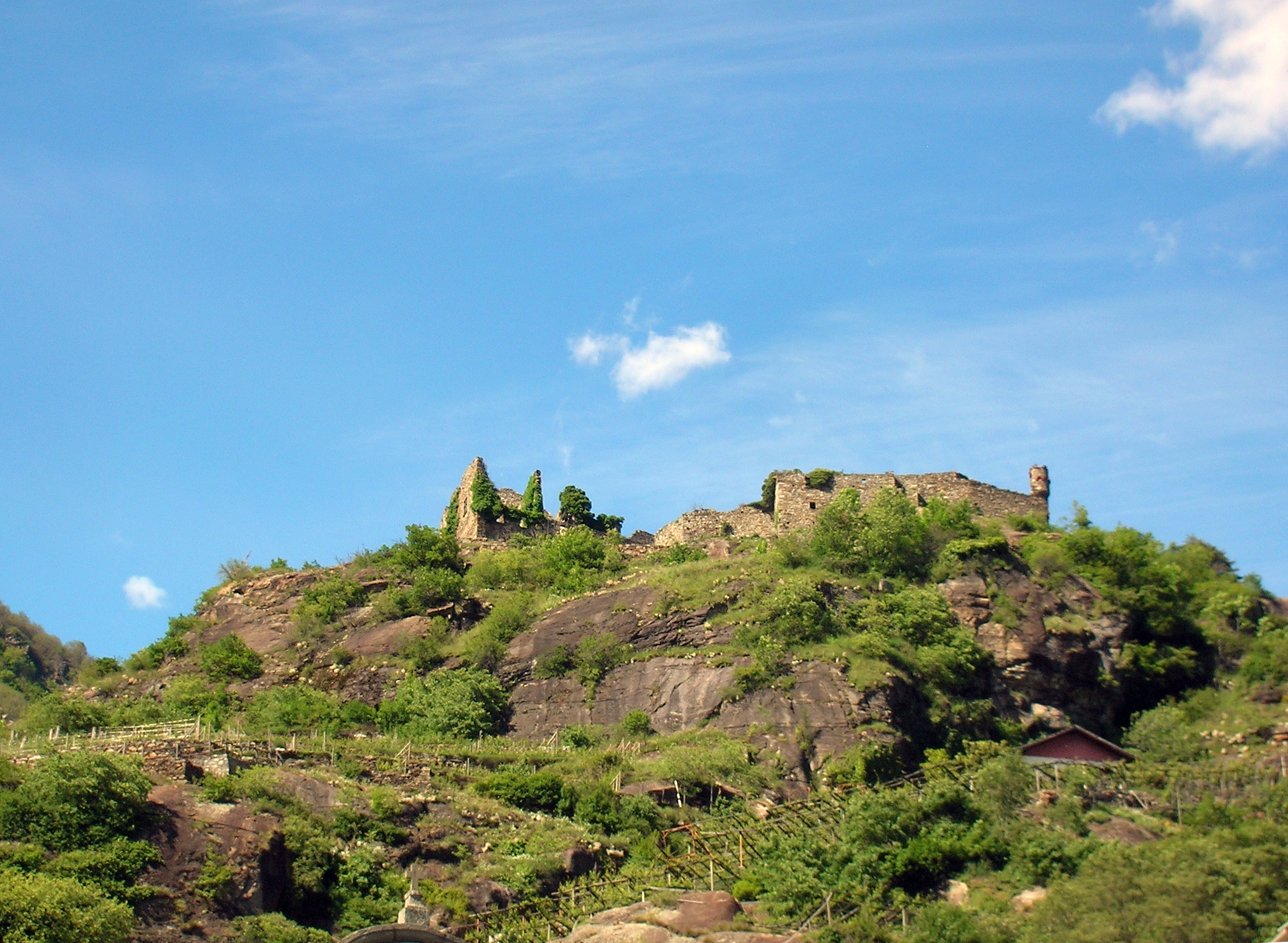 Castellaccio di Pont-Saint-Martin, Valle d'Aosta, Italia.